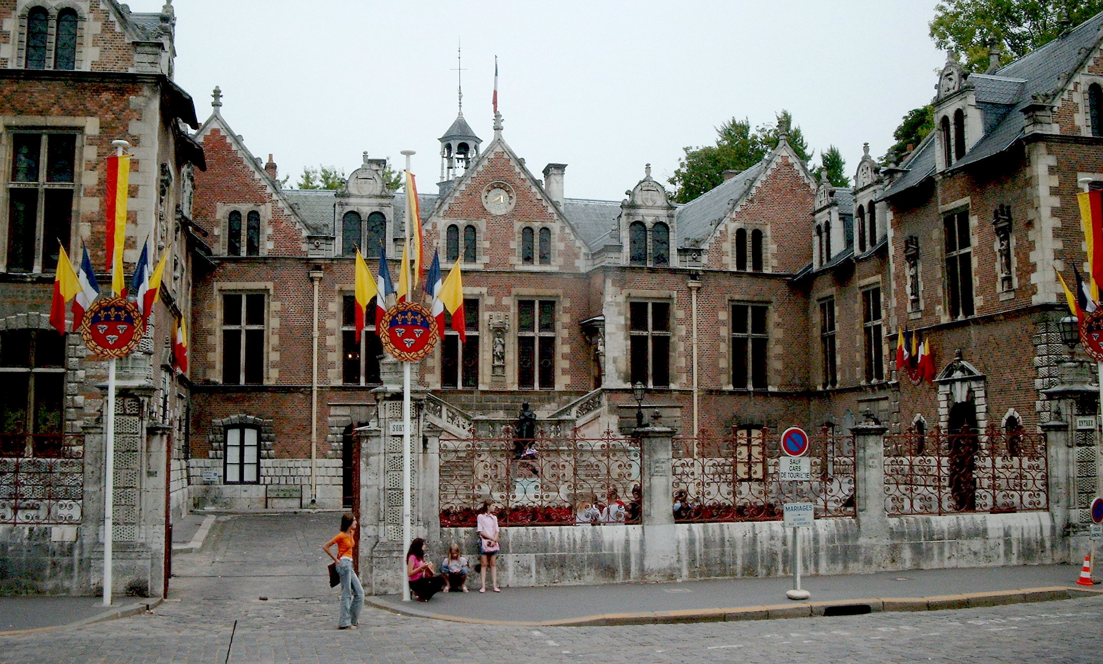 Hotel Groslot, siège de l'Hôtel de Ville d'Orléans, France.